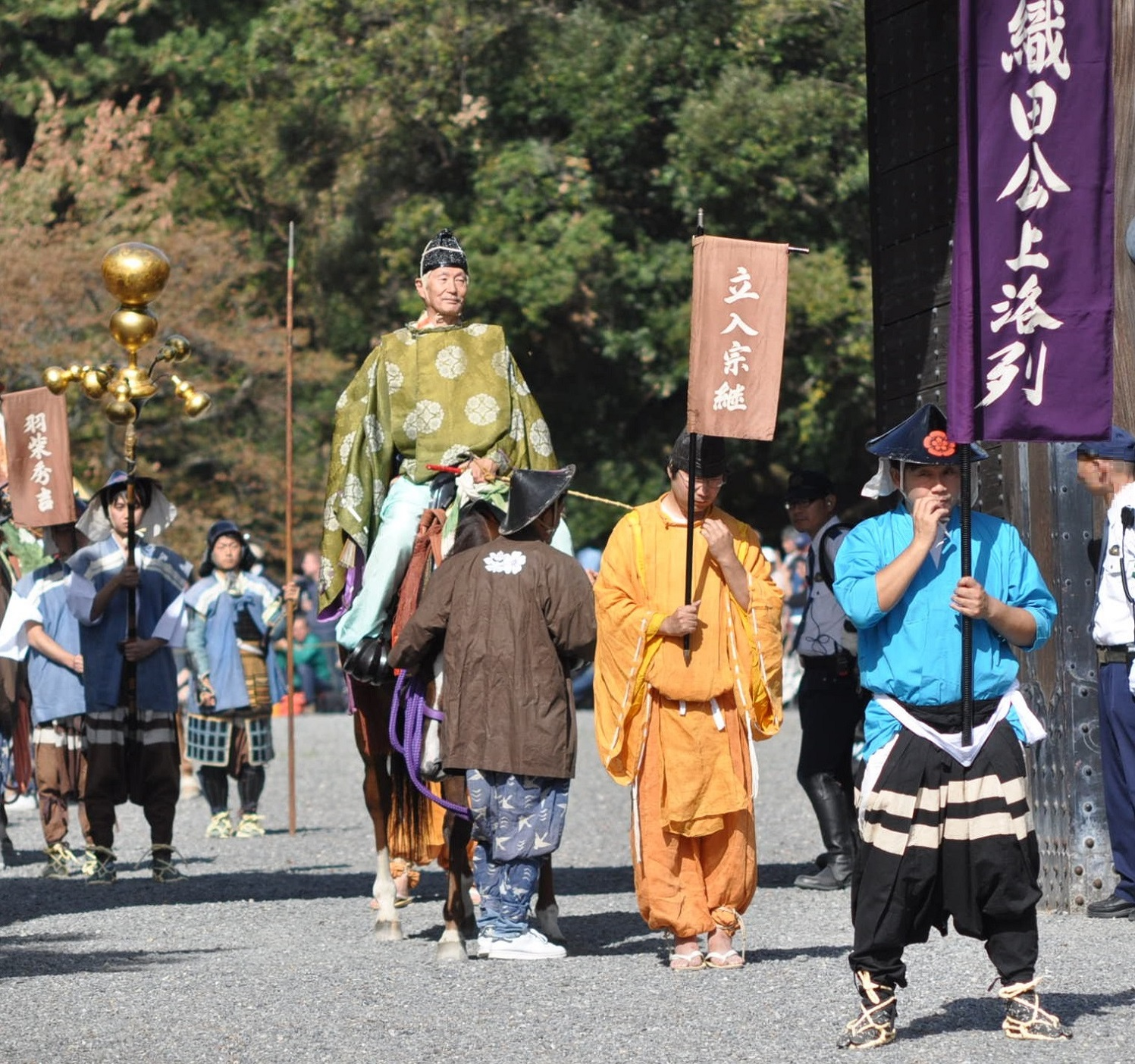 2018年時代祭より 織田公上洛列の先頭で馬に乗り登場する立入宗継